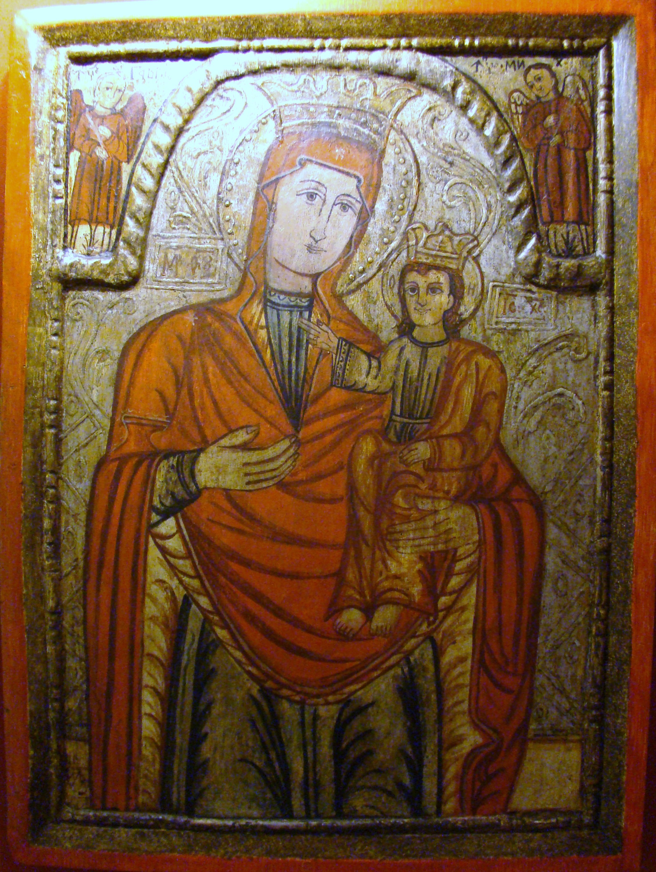 Icoană de Alexandru Ponehalschi (colecția Arhiepiscopiei Clujului)